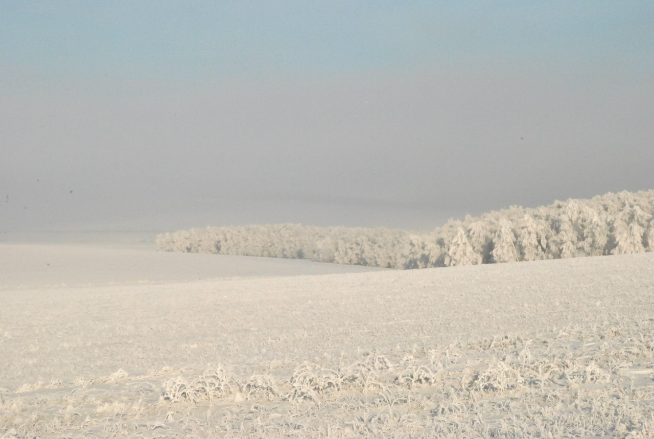 Благодарновский заказник: Ташлинский район, Оренбургская область This image is related to the protected area of Russia number 5610082